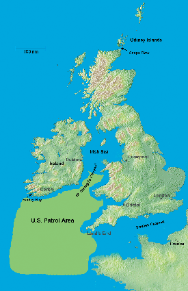 Patrol_area_USA_submarines WWI